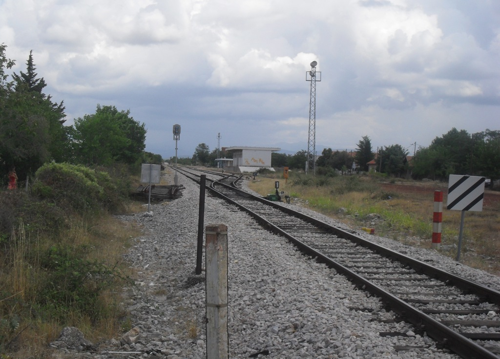 Željeznička postaja u Kistanjama, u Šibensko-kninskoj županiji.